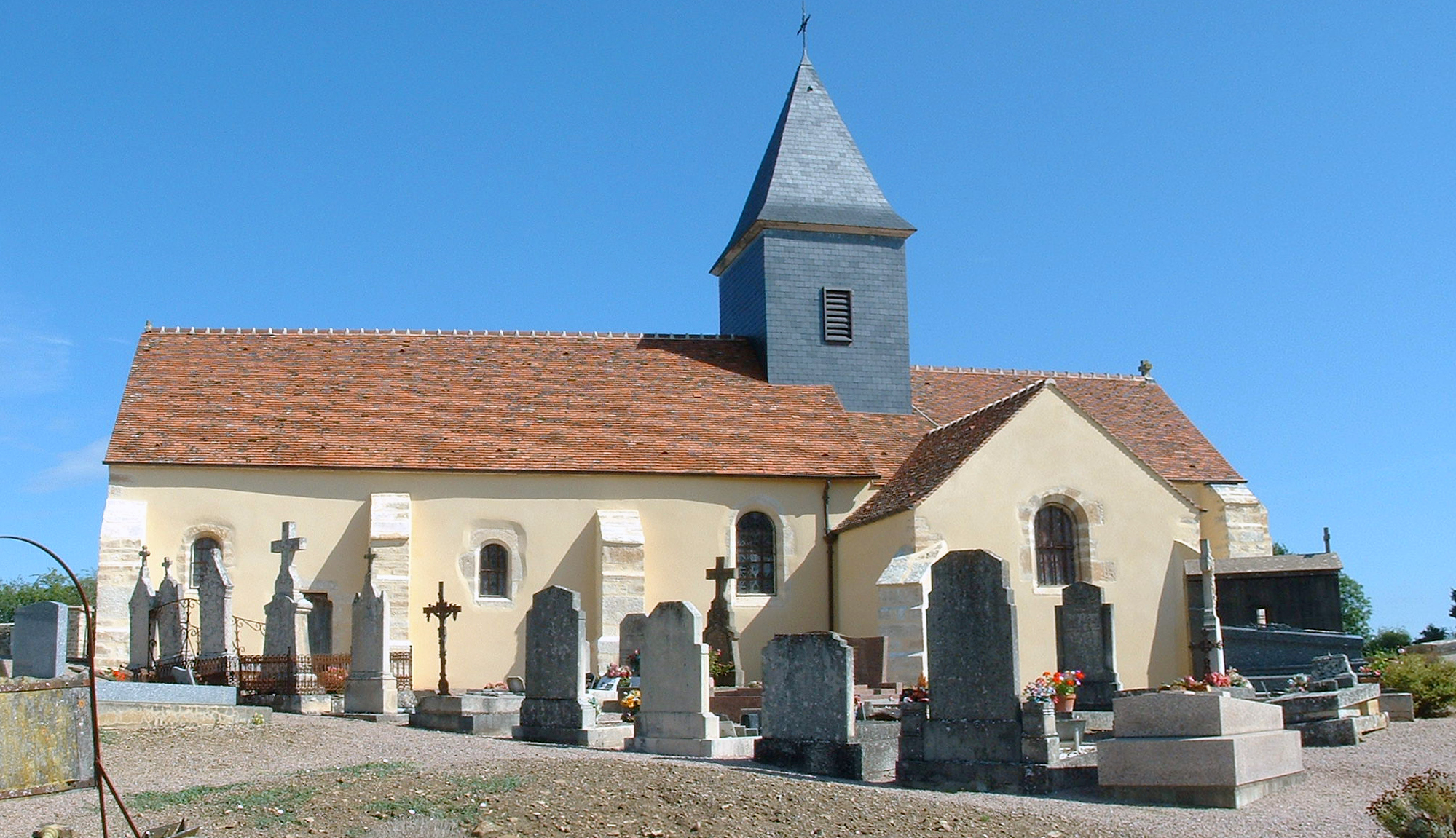 Eglise de Sceaux, Yonne